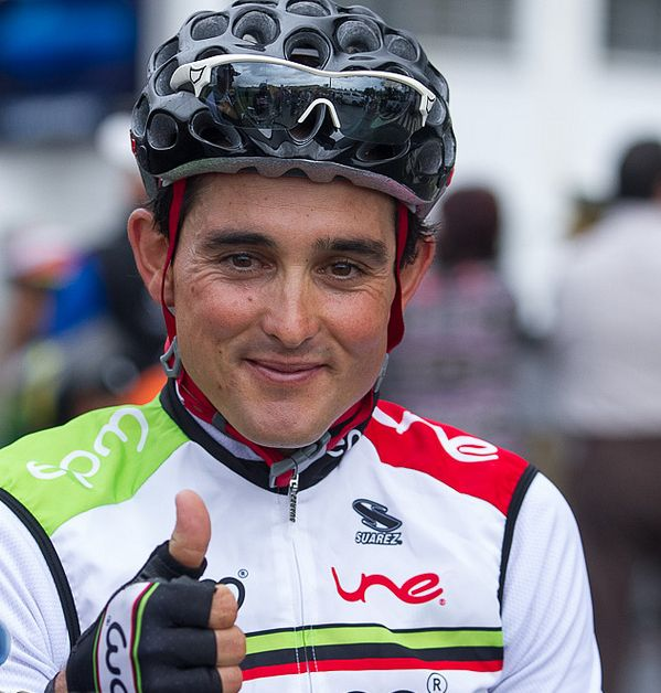 Óscar Sevilla con el maillot del EPM-Une en la Clásica José María Córdova - Rionegro